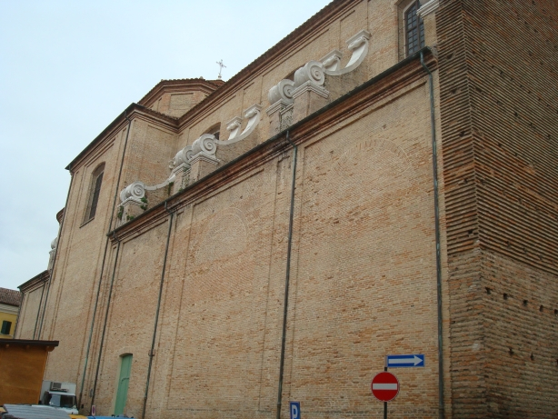 Cesena (Italie), façade latérale de la basilique Sant'Agostino